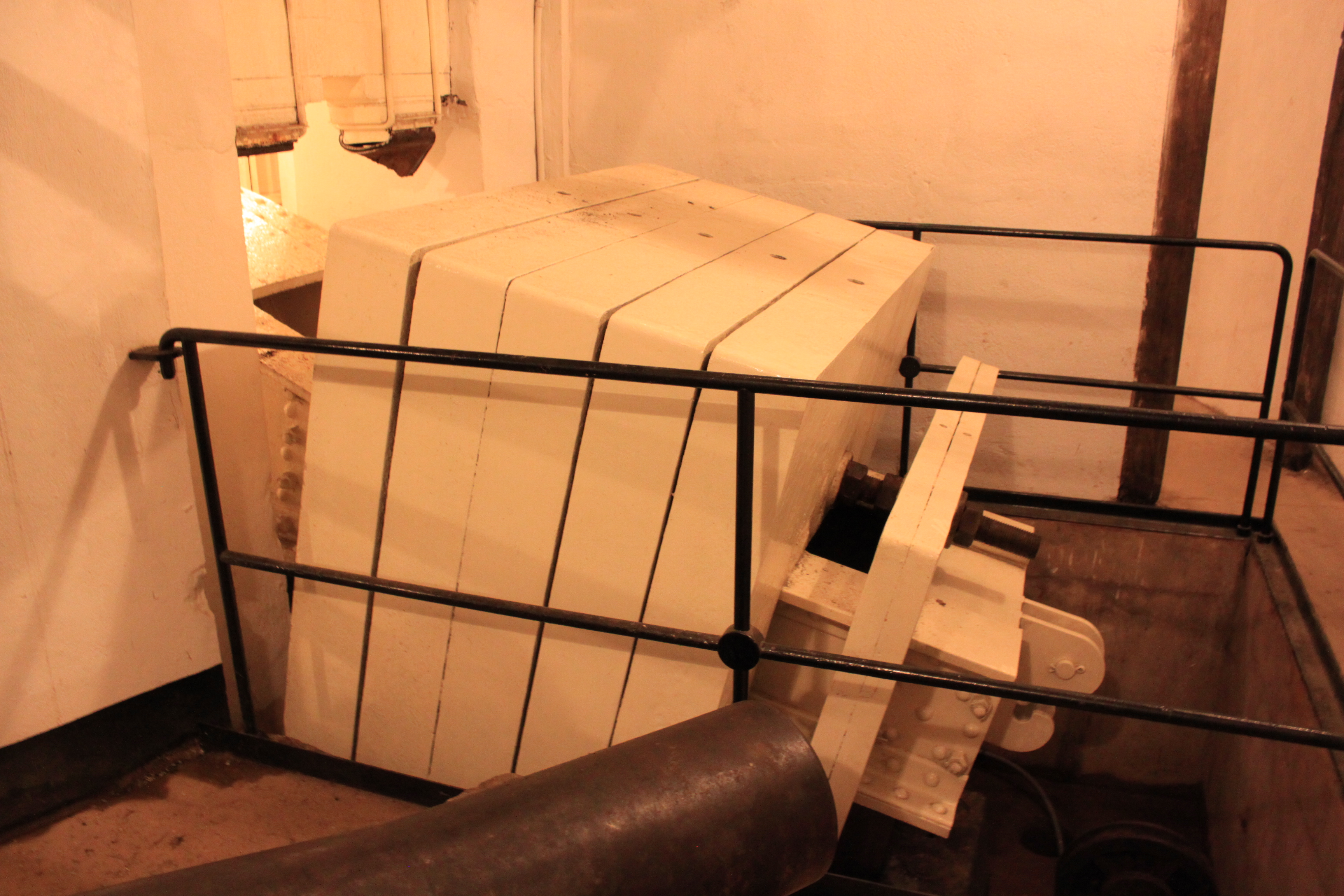 Fort d'Uxegney, Vosges, Lorraine, France